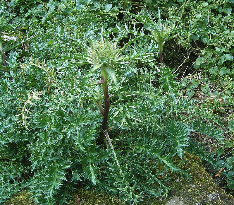 Carlina acaulis ssp. simplex